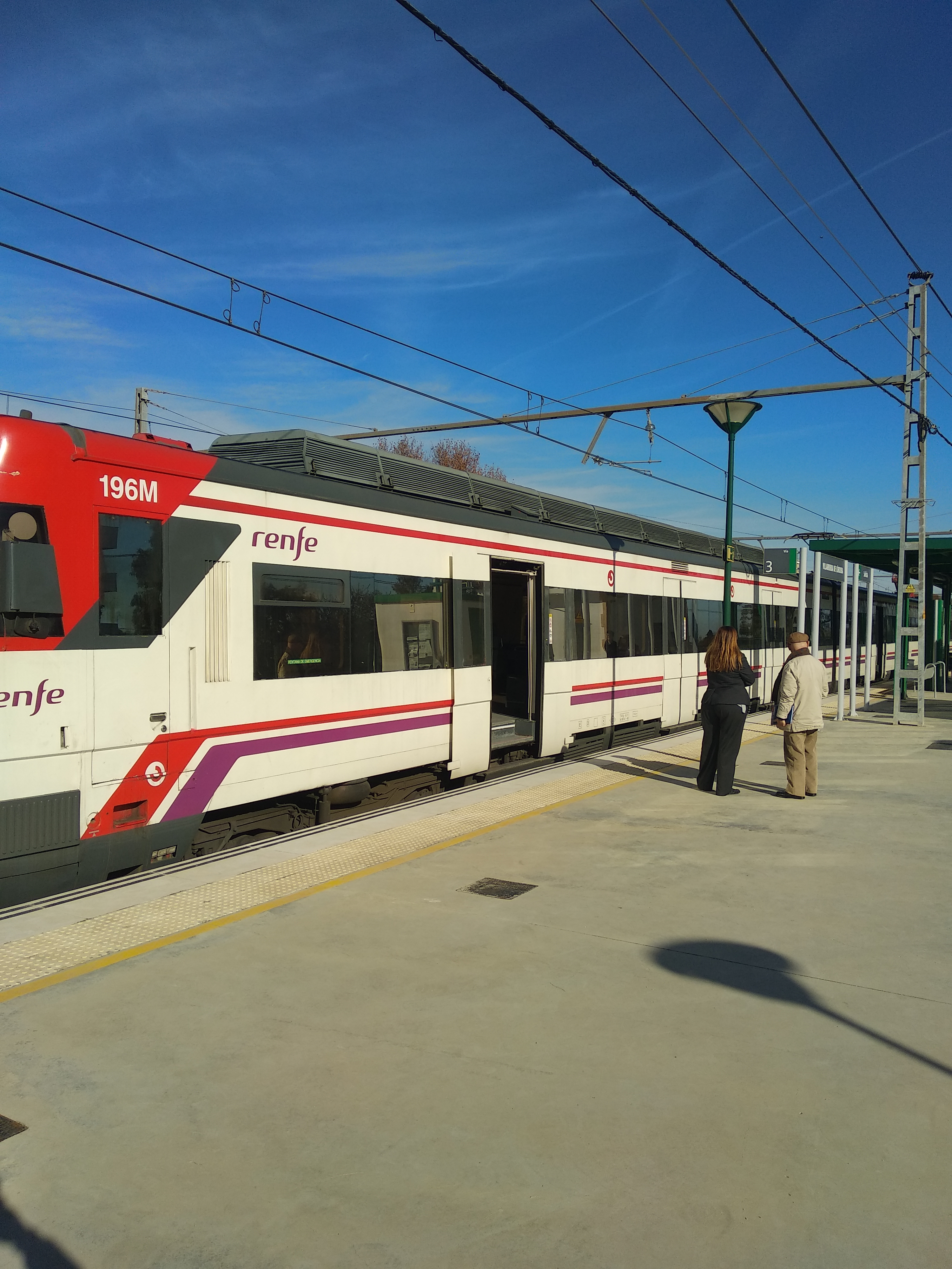 Automotor eléctrico S-446 en la Estación de Villarrubia de Córdoba.